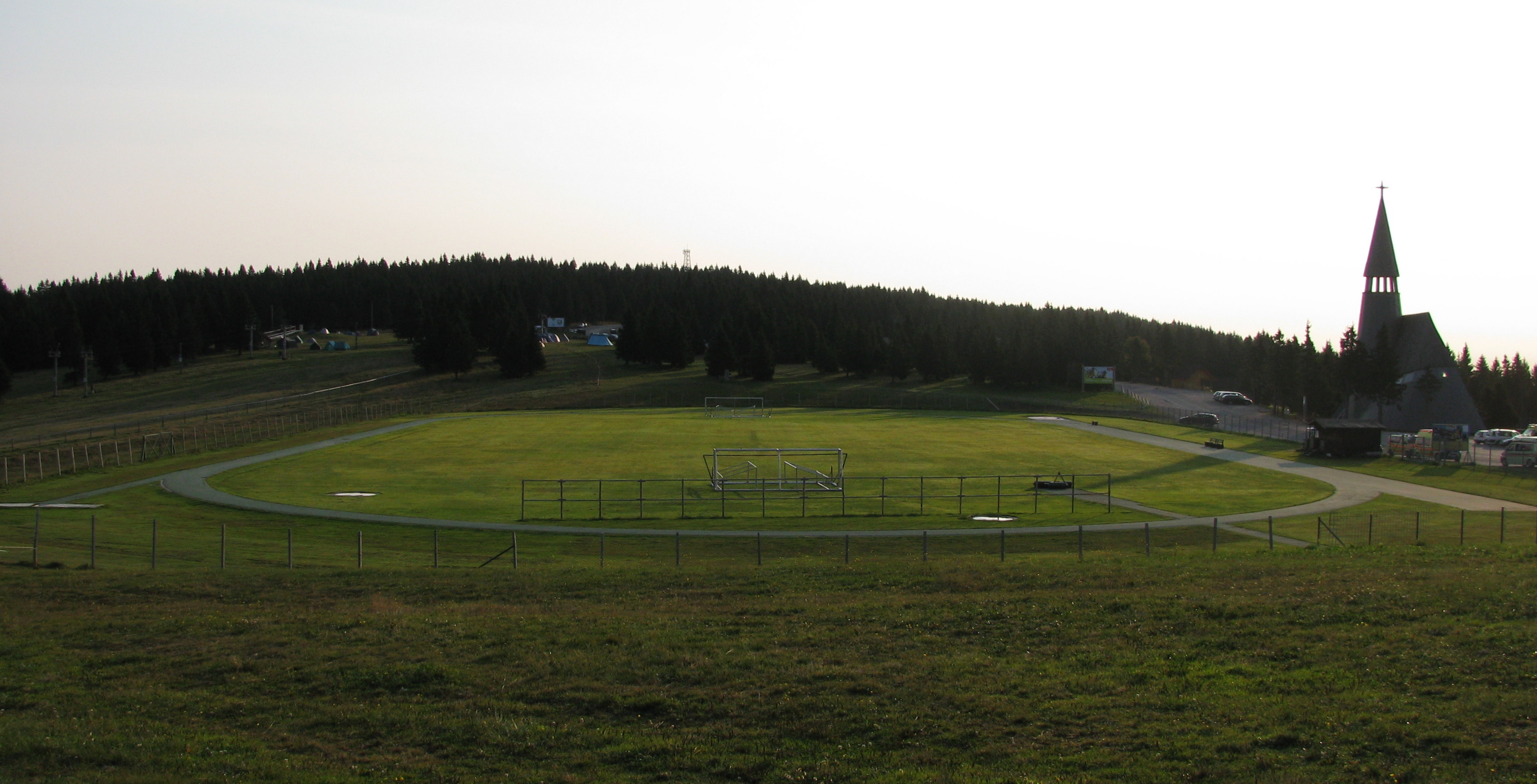 Rogla zjutraj